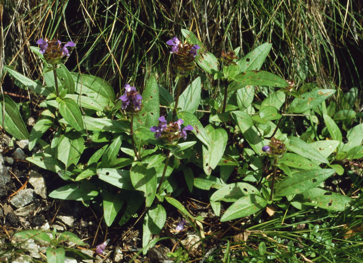 Großblüten-Brunelle (Prunella grandiflora), Lippenblütengewächse (Lamiaceae) - Österreich/Austria/Autriche: Tirol, Fernpass, Passhöhe